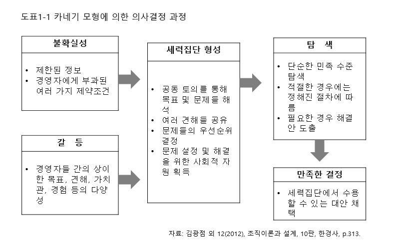 카네기 모형에 의한 의사결정 과정